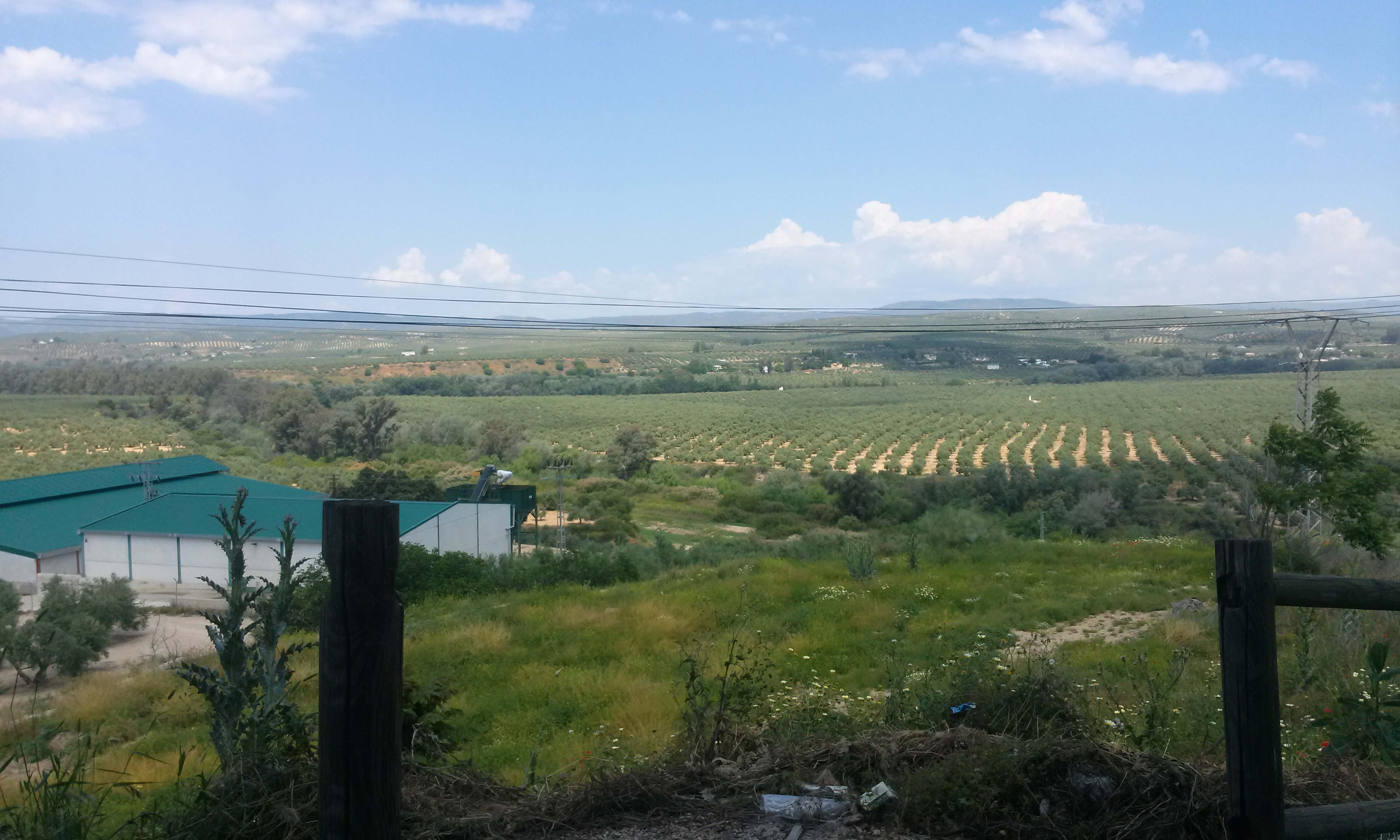 Vistas de la vega del Guadalquivir, desde Espelúy.